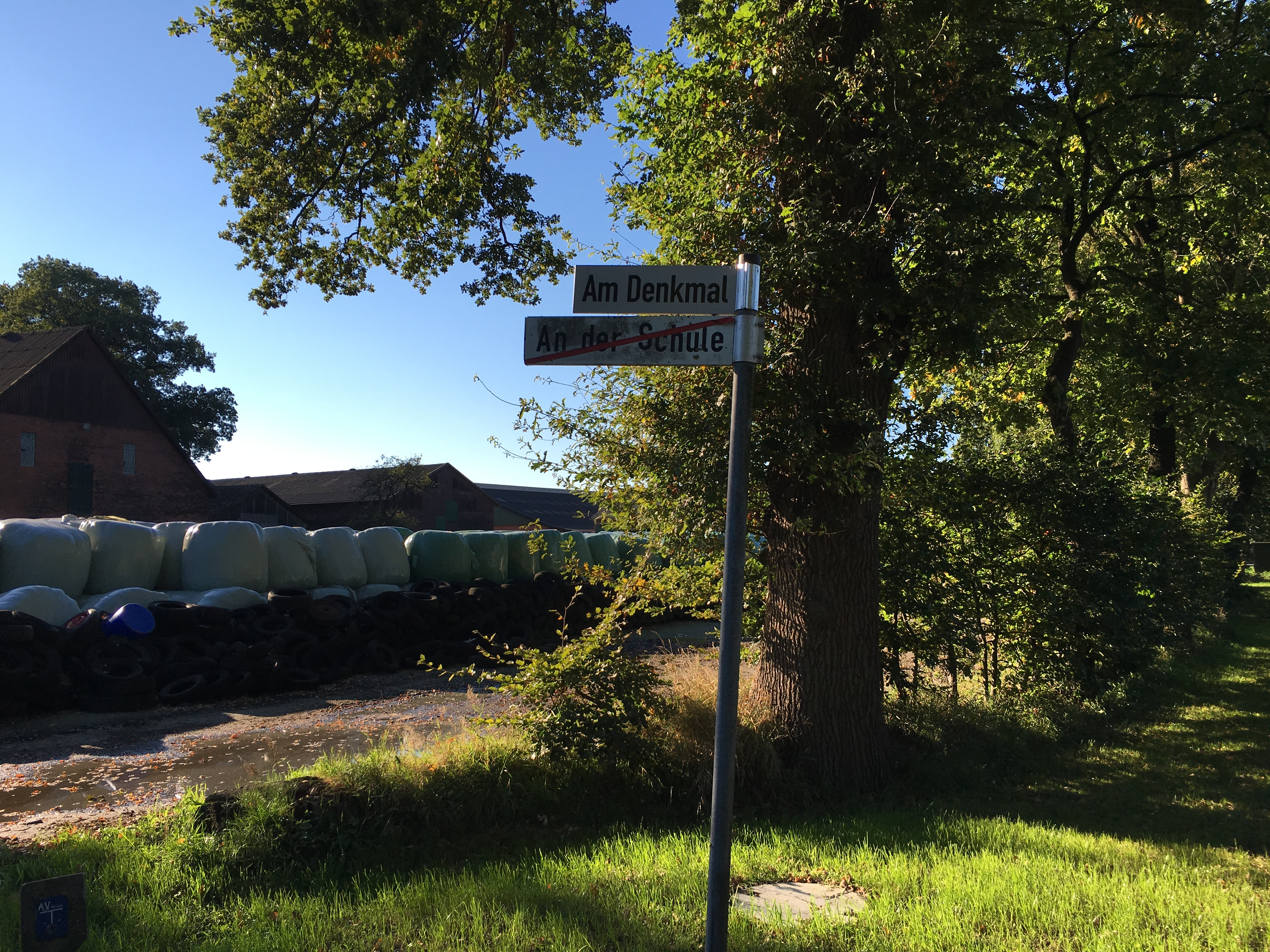 Stratenschild in Alfst, nadem 2015 en Reeg Straten ne’e Naams kregen hebbt (Fusion to de Gemeen Geestland)